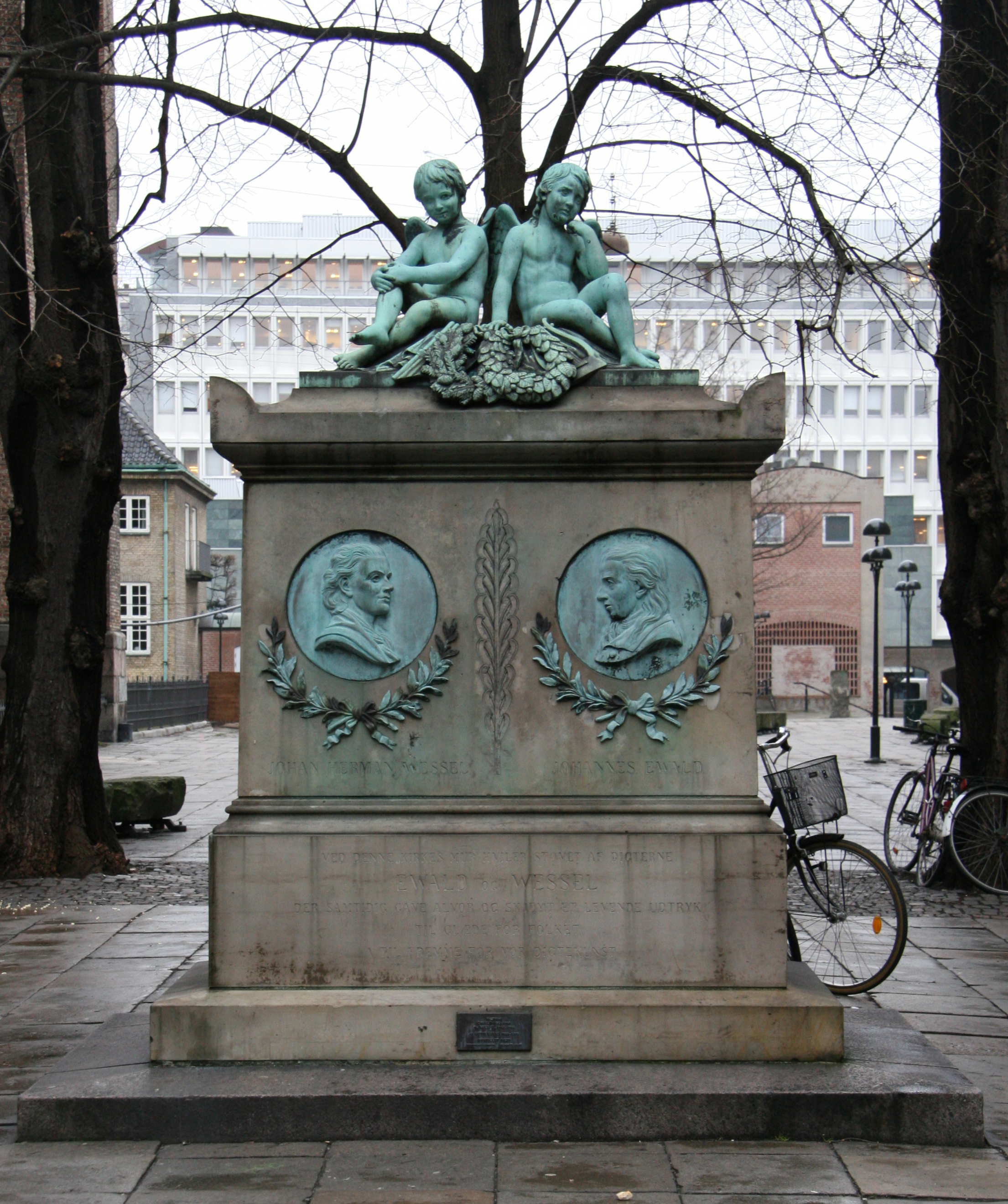 Trinitatis Kirke, Copenhagen, Denmark.Dobbeltmonument for Ewald og Wessel. 1879, sculpted by Otto Evens